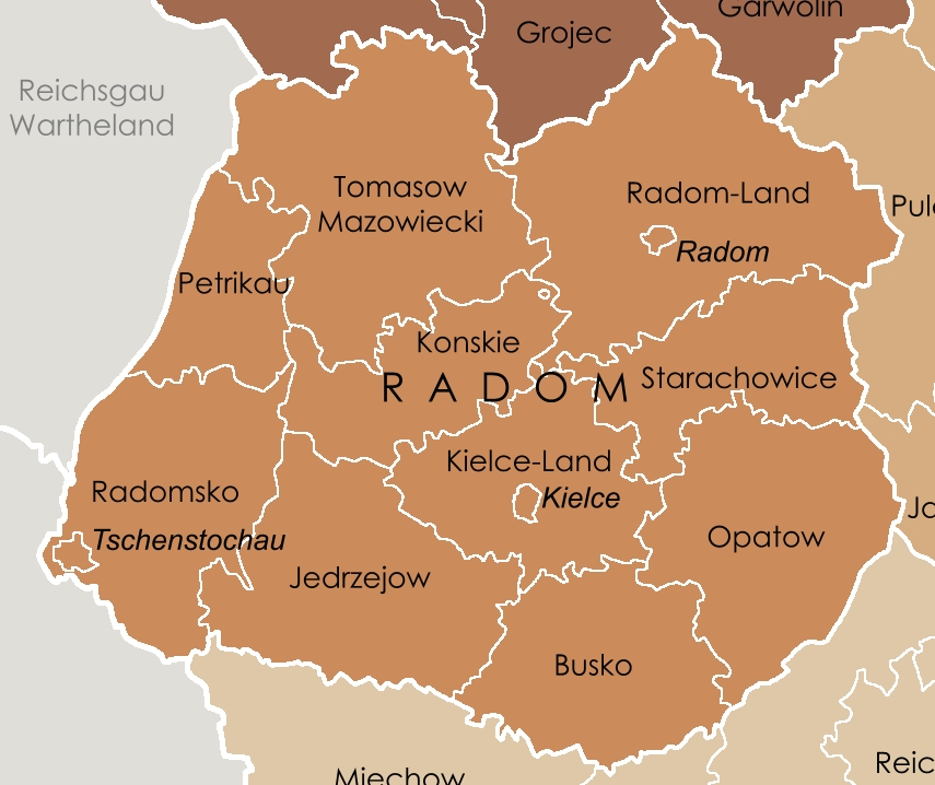 Distrikt Radom, Generalgouvernement